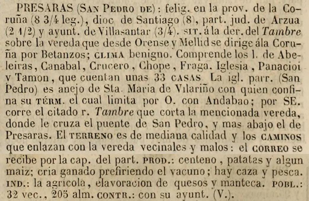 Présaras no Diccionario geográfico-estadístico-histórico de España y sus posesiones de Ultramar.